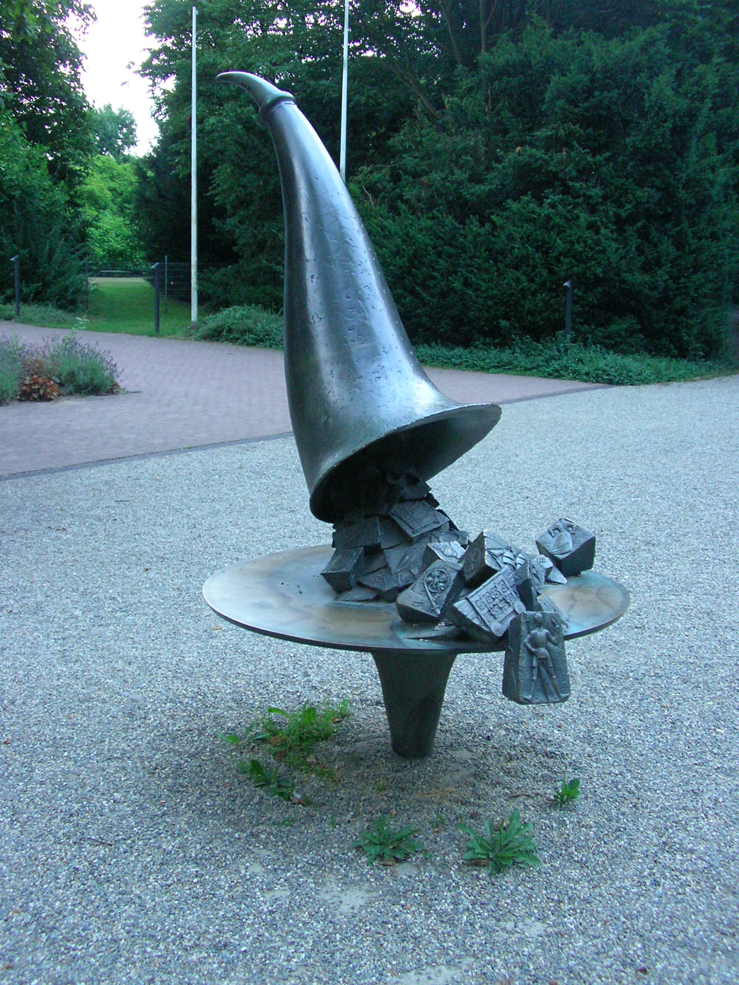 Füllhorn - Plastik vor dem Eingang zum Focke-Museum in Bremen Focke Museum Native nameFocke-MuseumLocationBremen, GermanyCoordinates53° 05′ 33″ N, 8° 51′ 51.01″ E Established1918/1959Web page control : Q1434990 VIAF: 124811512 ISNI: 0000 0001 2353 0539 LCCN: n83199524 GND: 39040-9 SUDOC: 079226906 WorldCat institution QS:P195,Q1434990